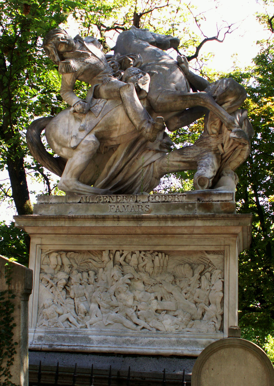 Grave of general Jacques Nicolas Gobert (né à Basse-Terre (Guadeloupe) le 22 mai1760-meurt le 17 juillet 1808 en Espagne) in the cemetery of Père Lachaise